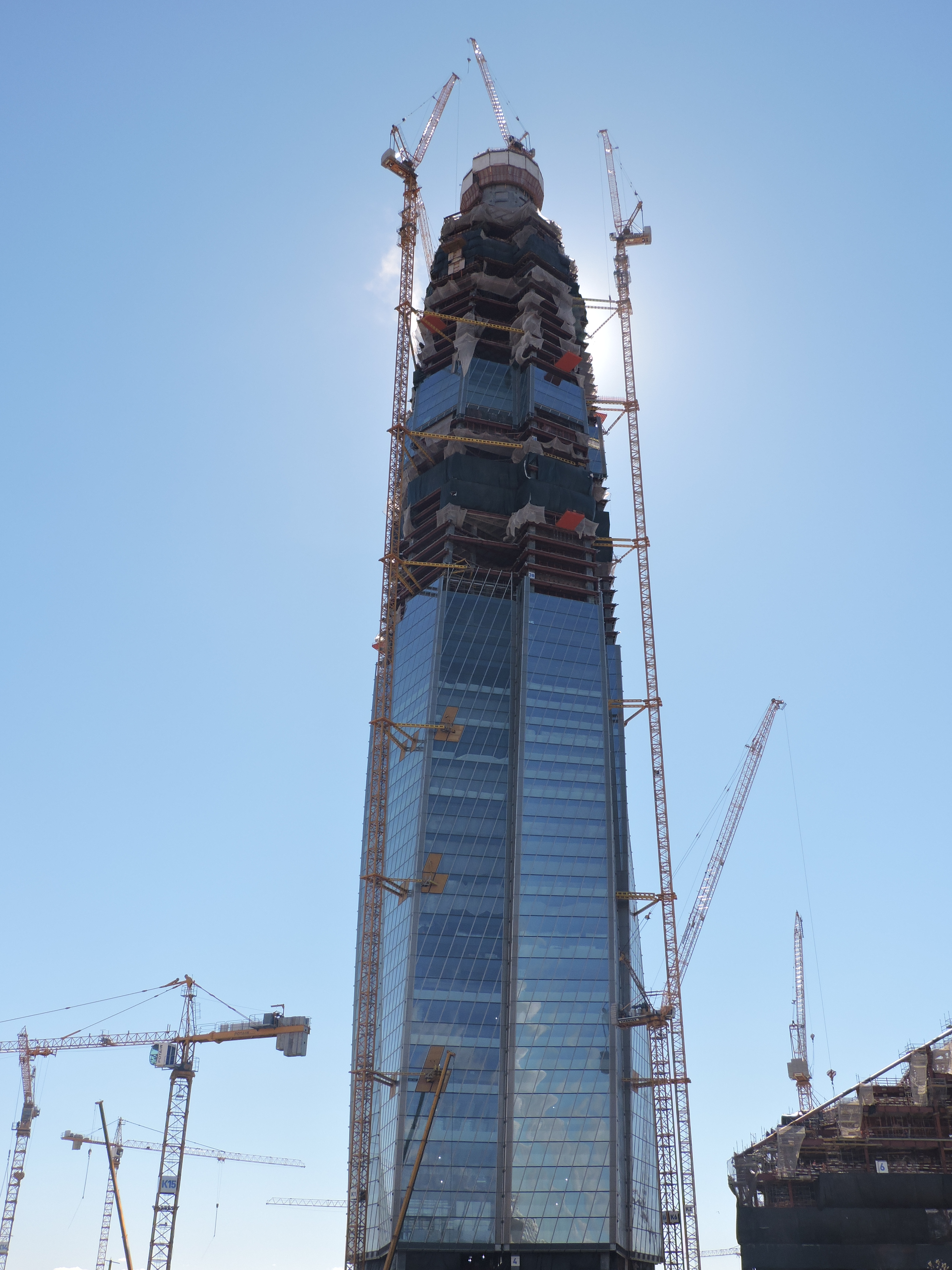 Строительство башни Лахта-центра (май 2017)